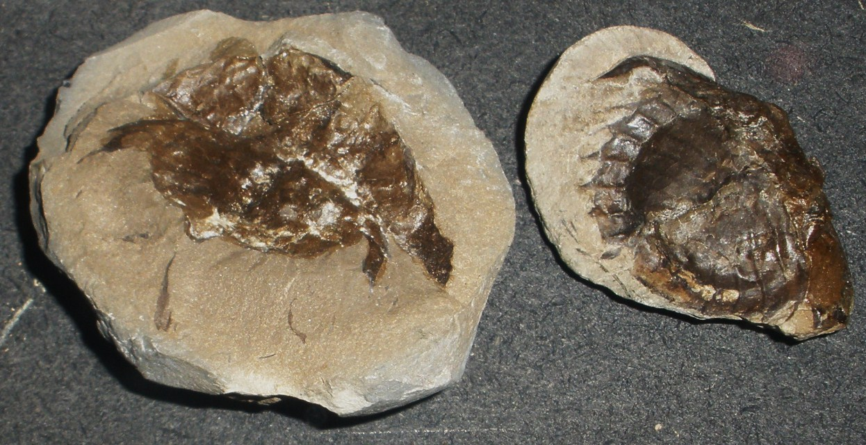 Fossil of Euproops, an extinct arthropod- Took the photo at Natural History Museum of Maastricht